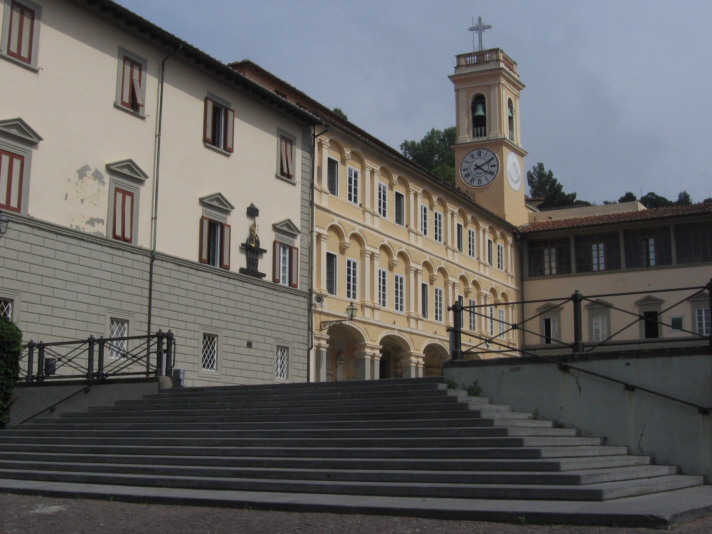 Livorno: il Santuario della Madonna delle Grazie sul colle di Montenero, che deve l'aspetto attuale ad interventi settecenteschi.